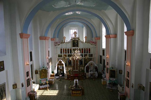 Церковь Воскресения Христова г. Клецк